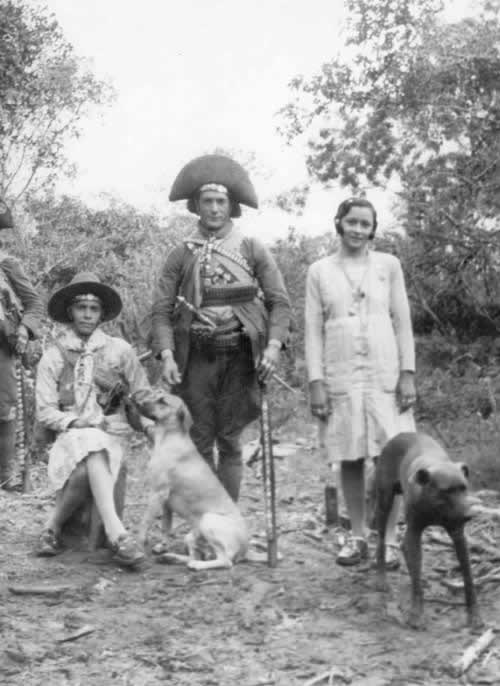 Retratos do cangaço: Lampião e Maria Bonita